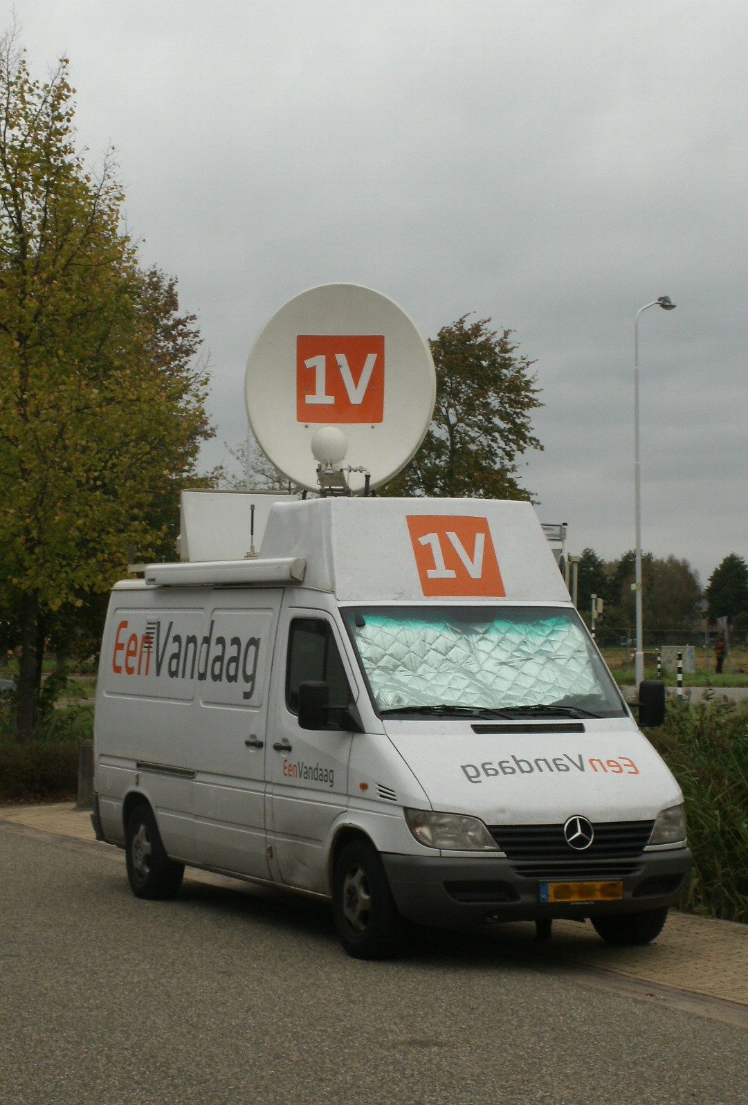 Auto van het AVRO/TROS actualiteitenprogramma EenVandaag